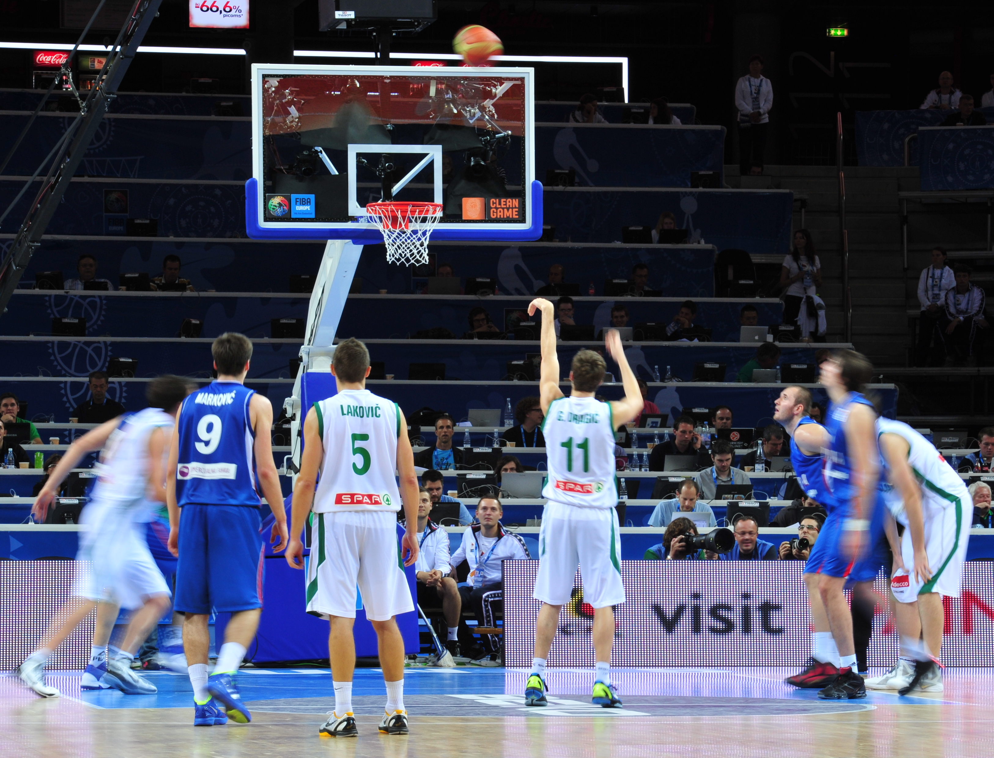 IRM_1169